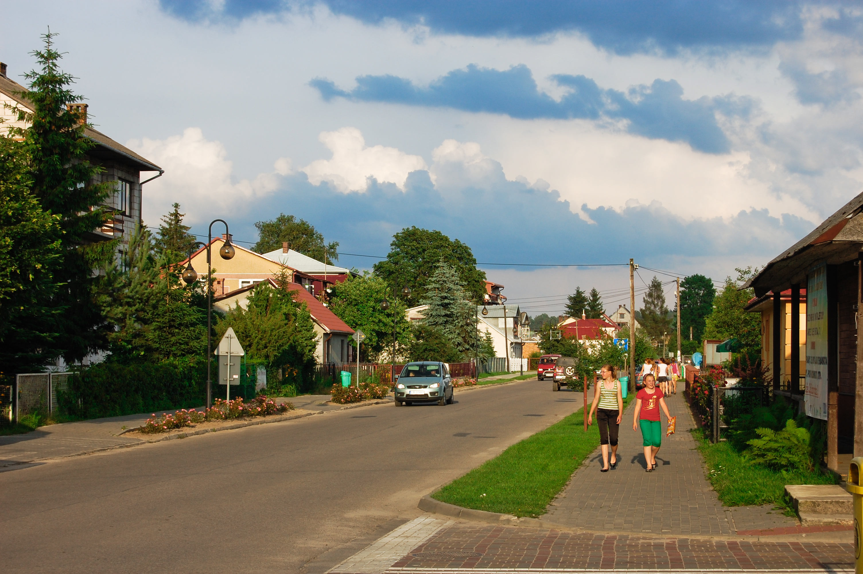 Centrum Krasnobrodu